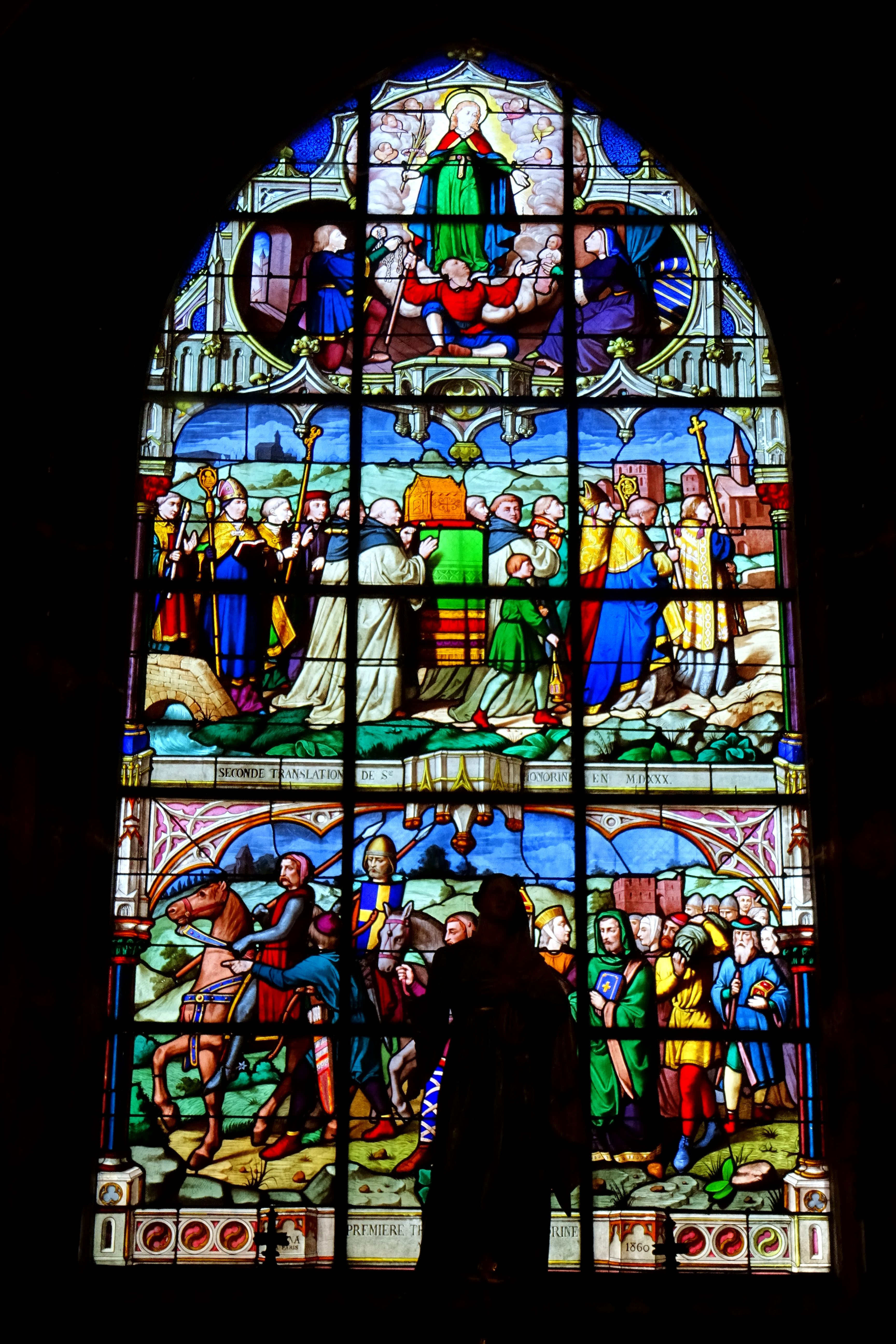 Chapelle latérale nord, 2e travée (chapelle Sainte-Honorine), verrière n° 5 - translation des reliques de Sainte Honorine, réalisée par la maison Ména, Ménilmontant, en 1861.